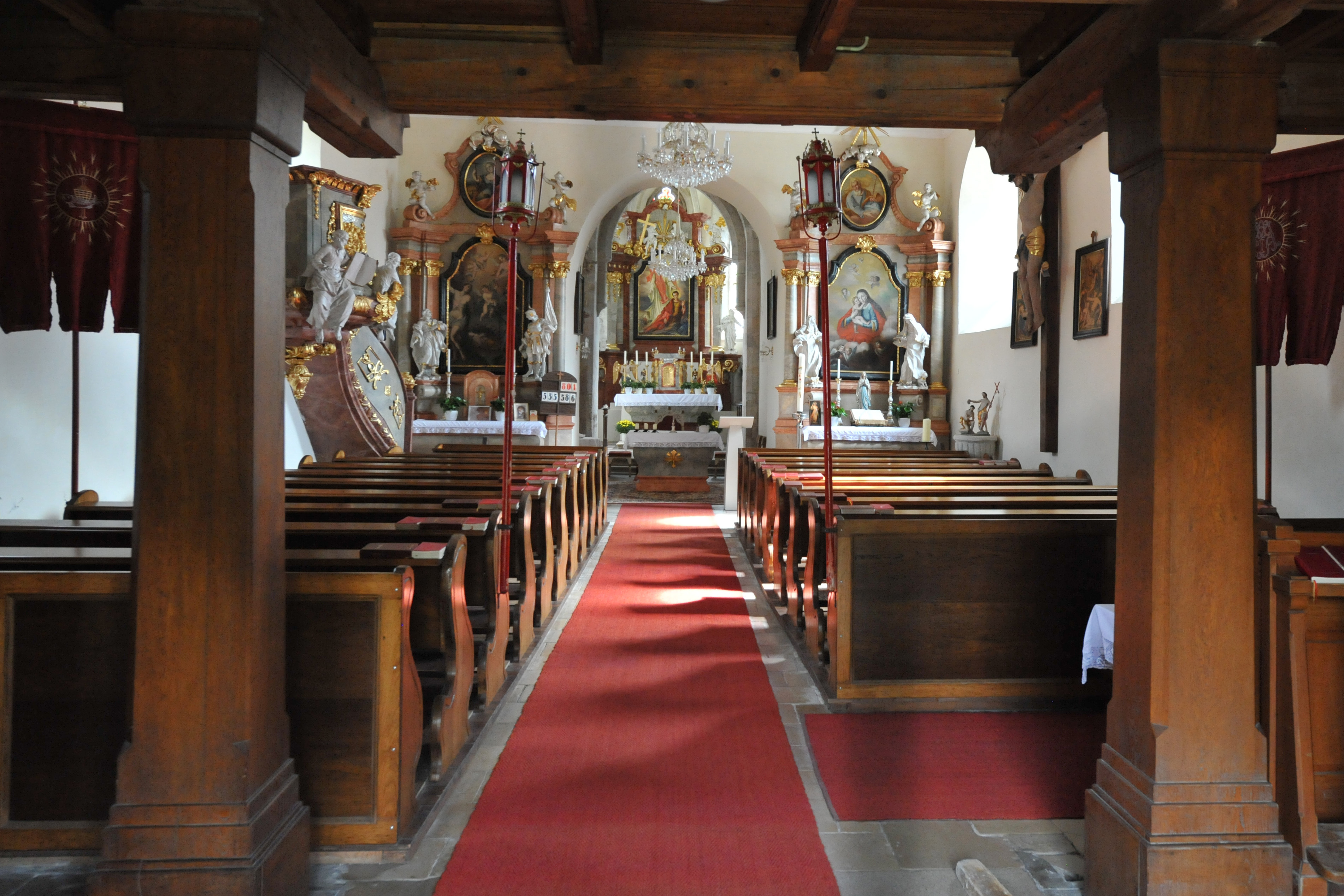 Kath. Pfarrkirche hl. Martin